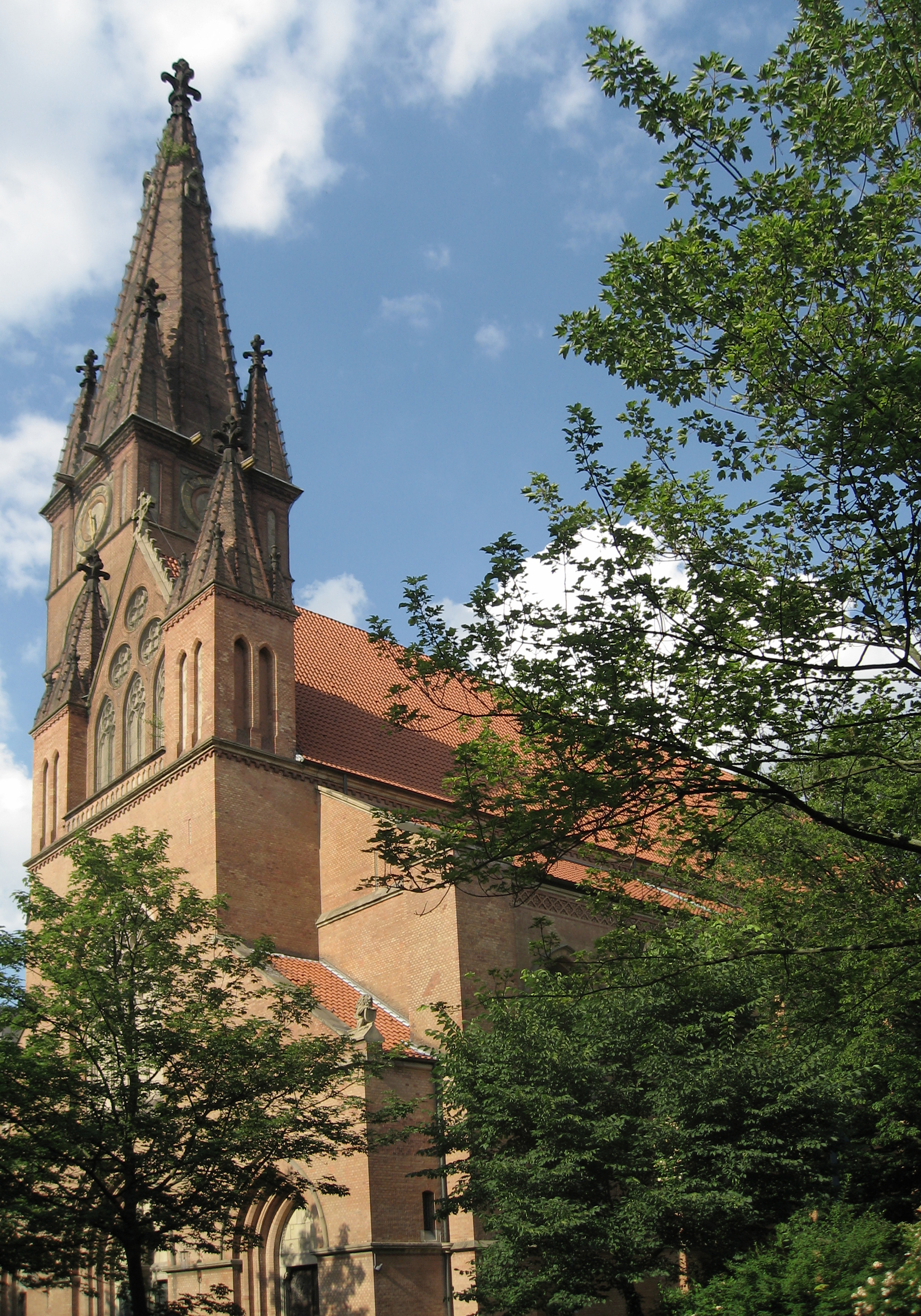 Dortmund, Liebfrauenkirche, Westfassade von Südwesten. Amalienstraße